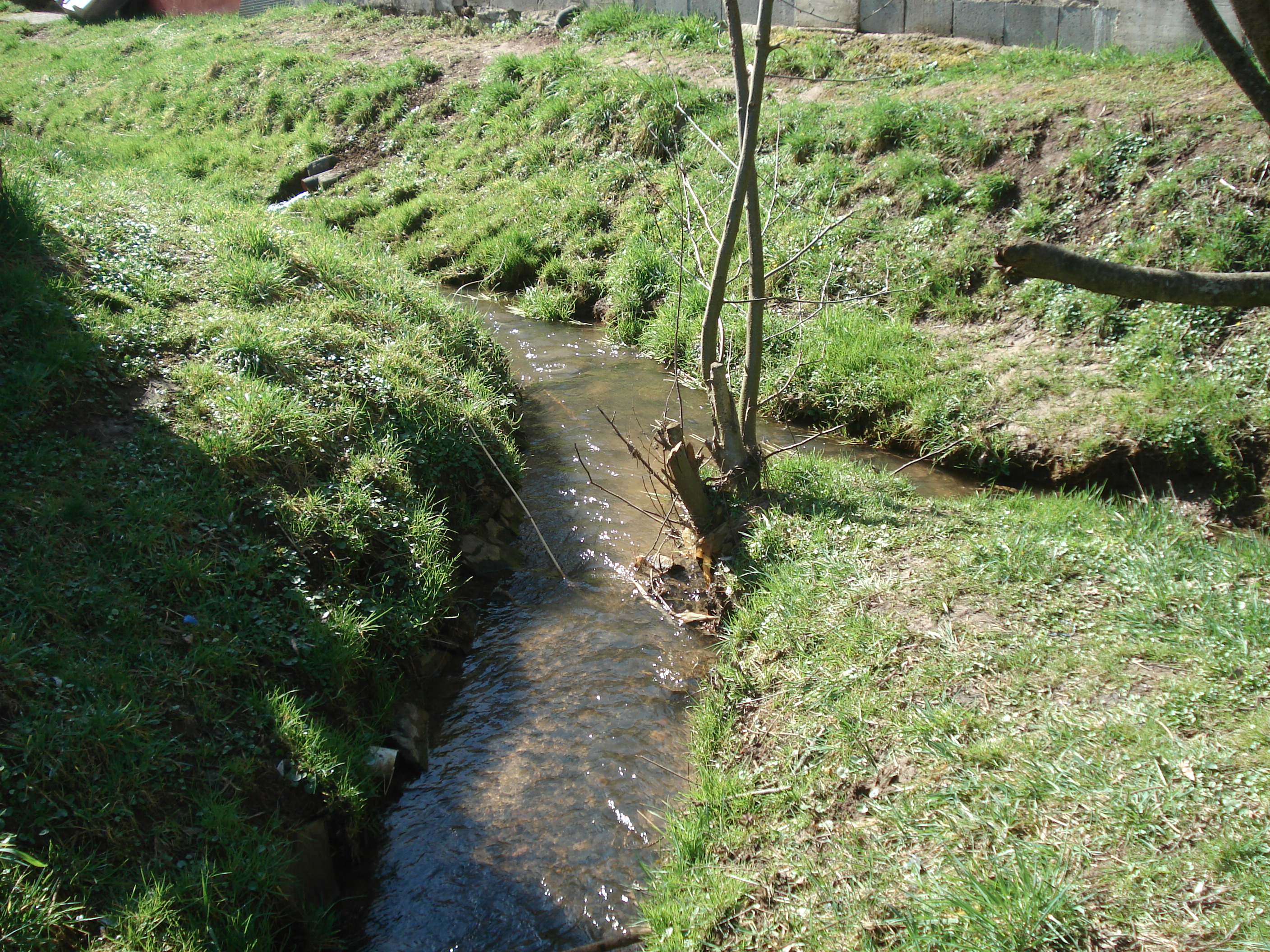 Die Wehmig vereinigt sich mit dem Eichbach (rechts) zum Weibersbach